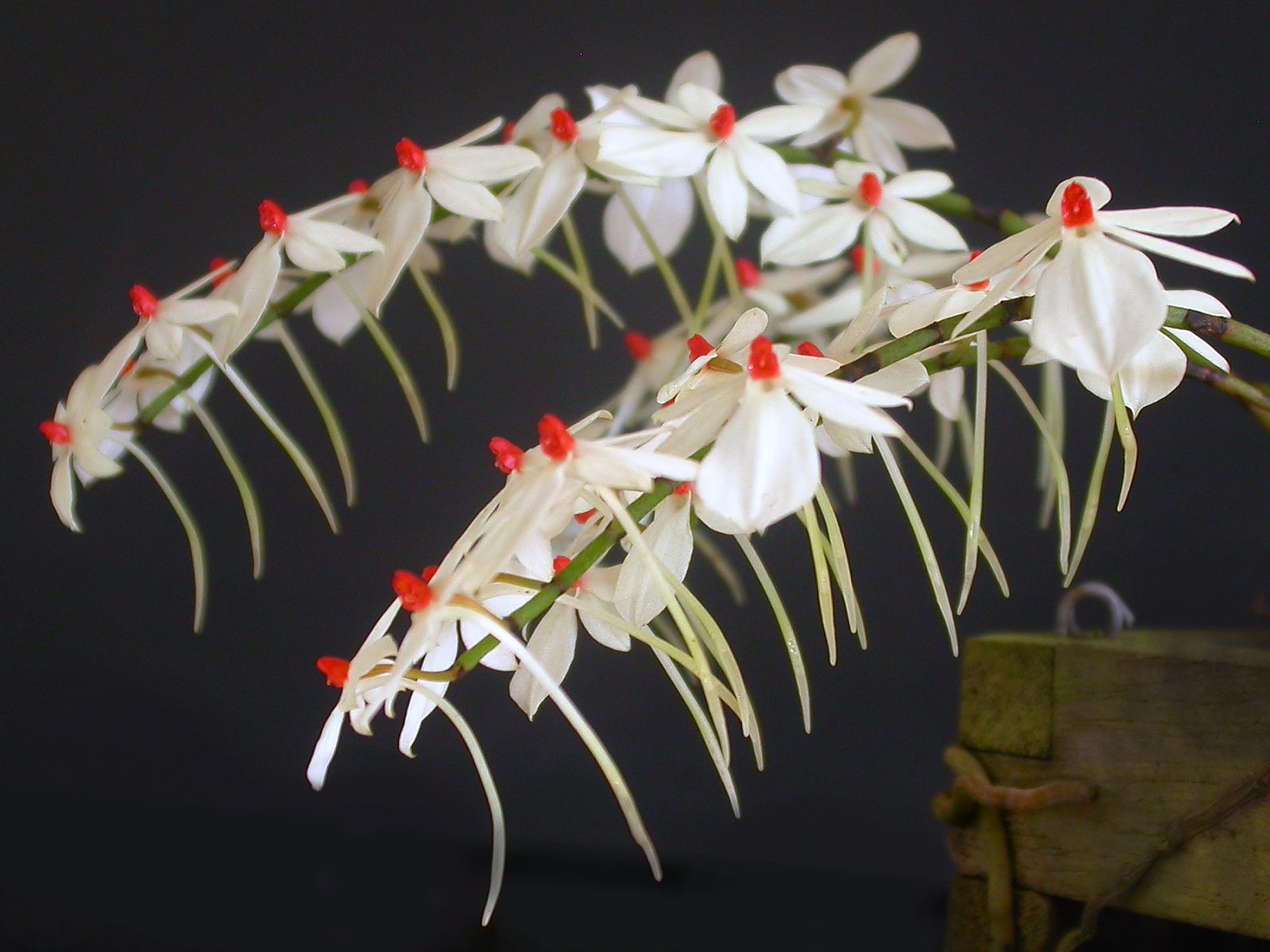 foto datada de 4 de março de 2009.